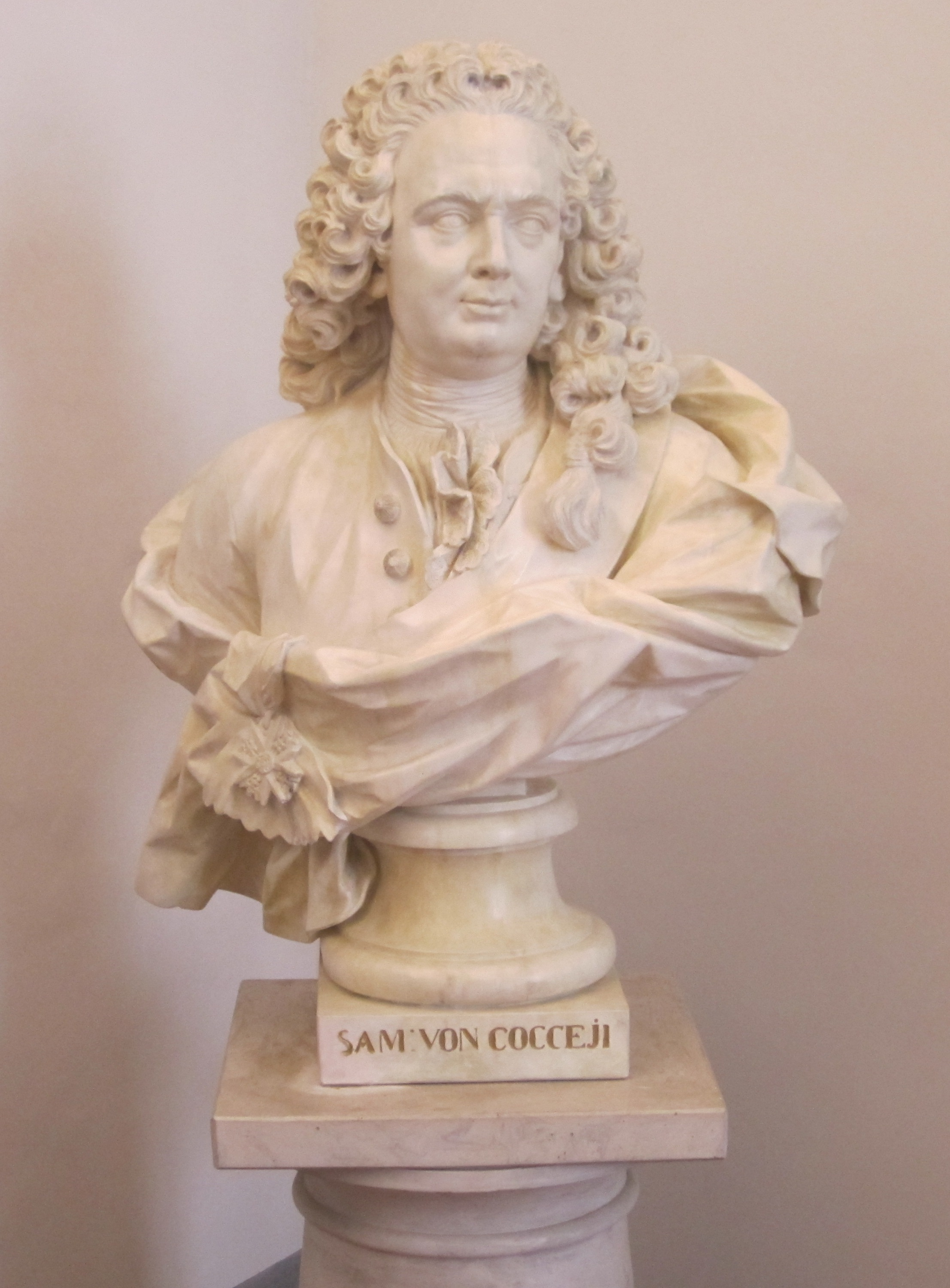 Büste Samuel von Cocceji (1679–1755) von Johann Gottfried Schadow